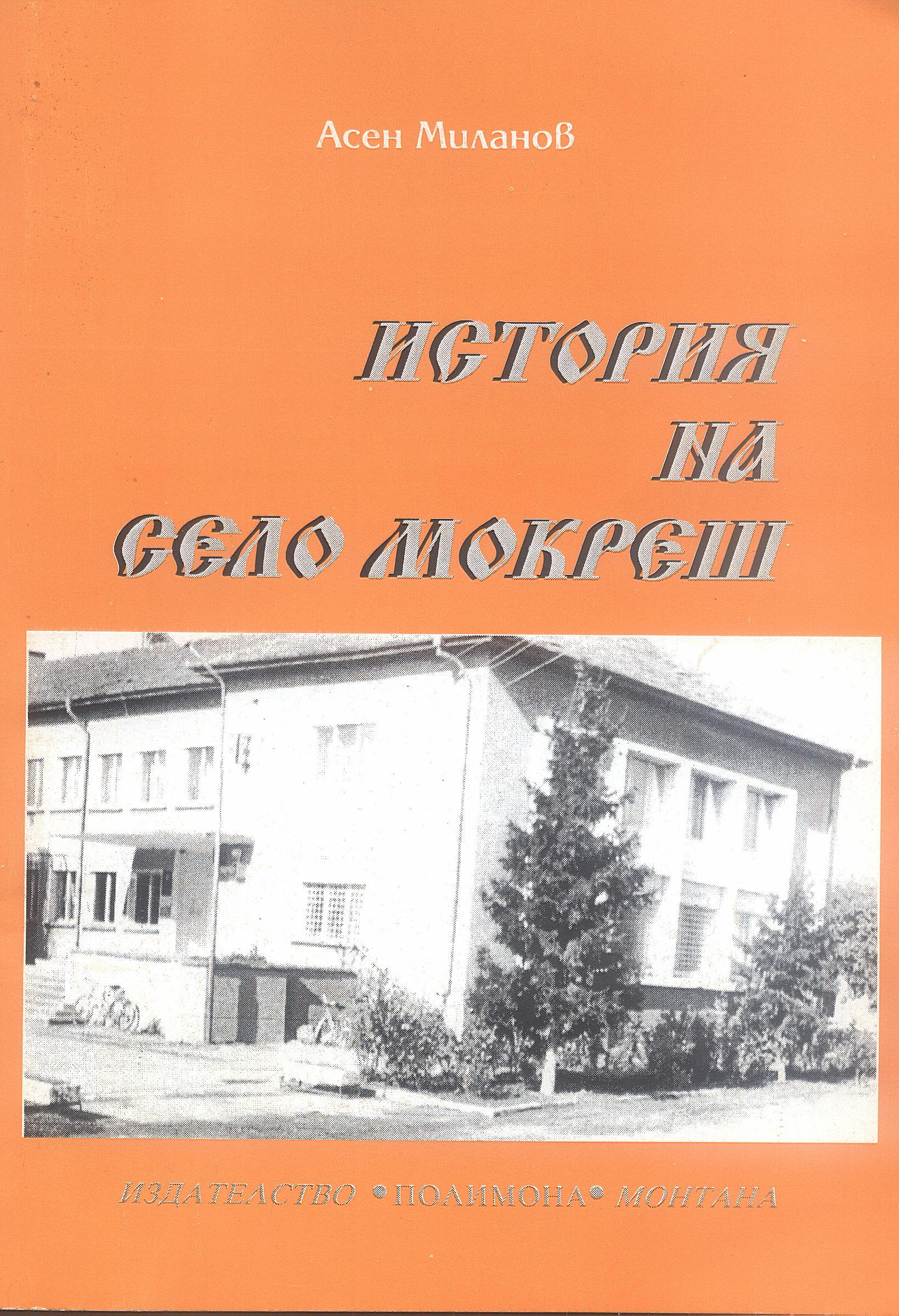 Книгата - История на село Мокреш